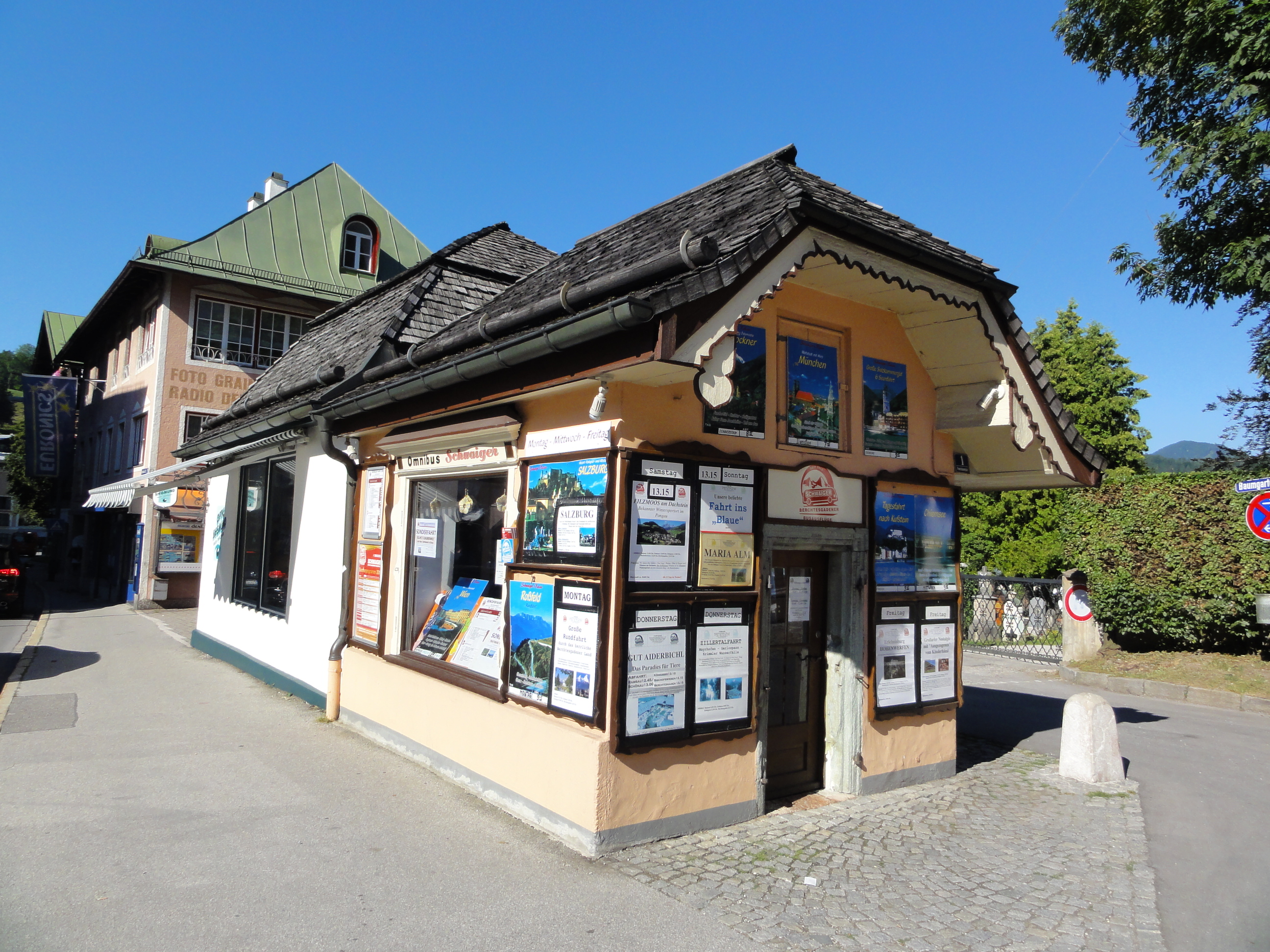 Germany, Bavaria, Berchtesgaden, Franziskanerplatz 1